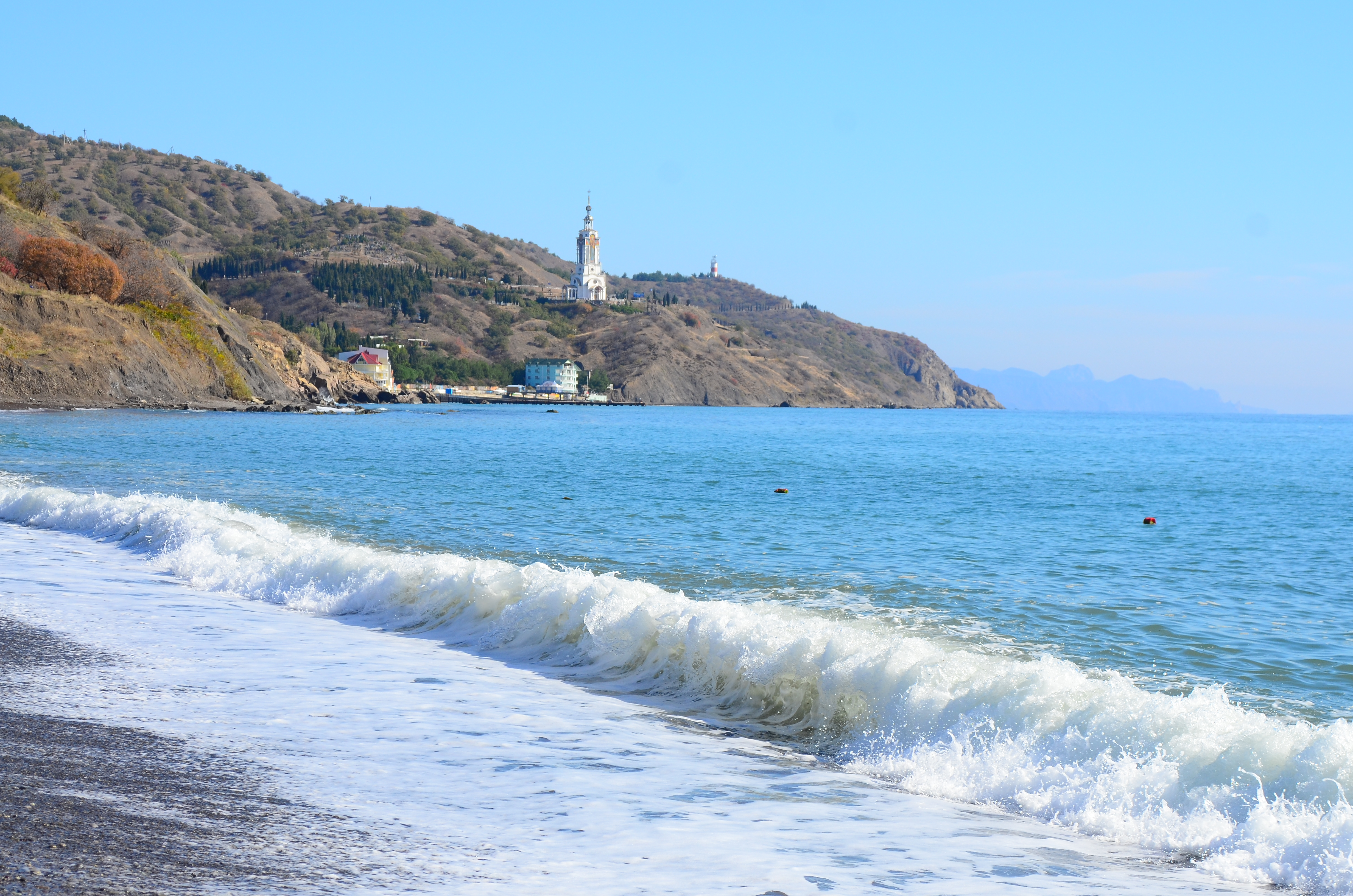 Крым.